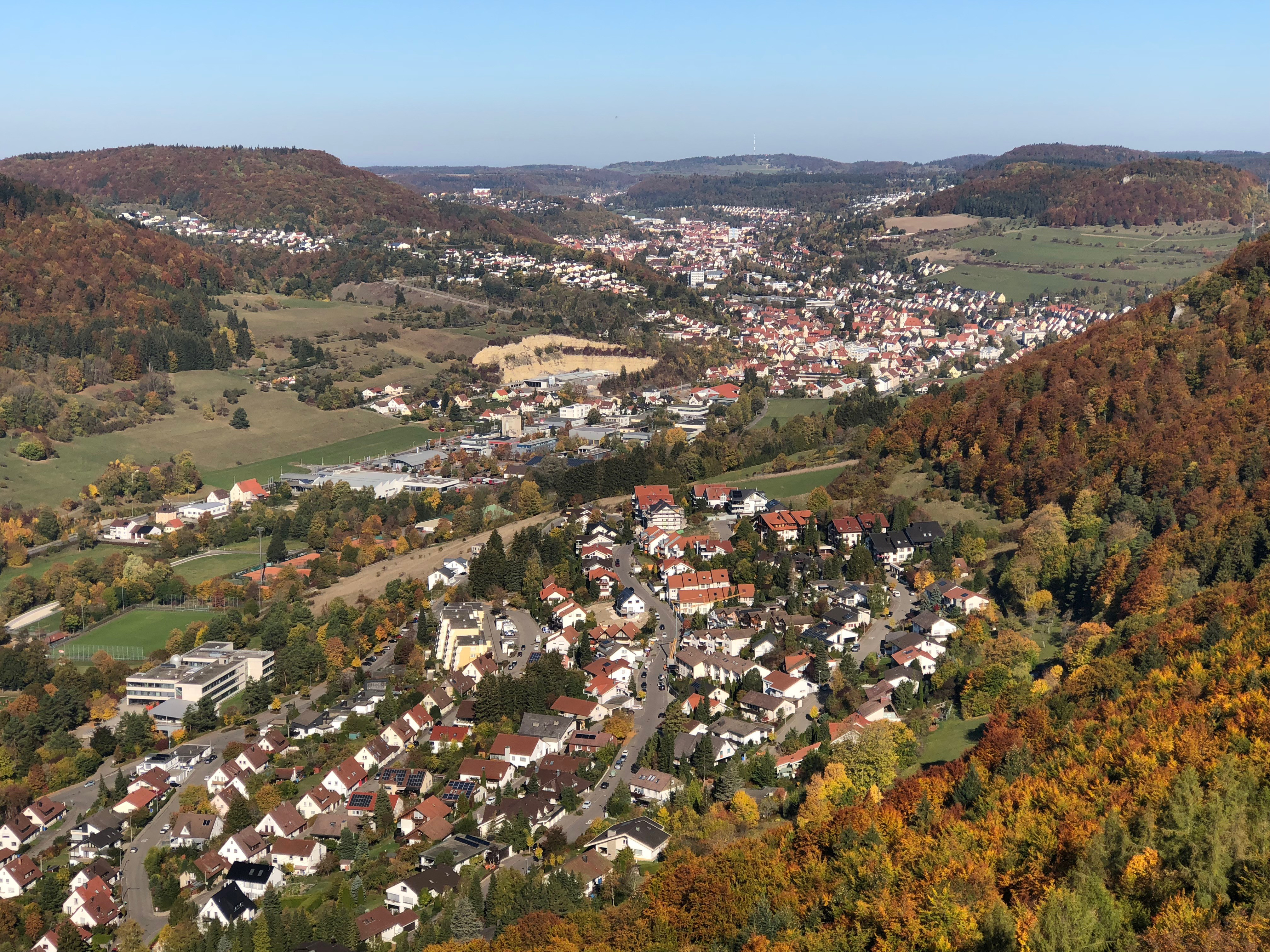 vom Schlossbergturm aus gesehen.